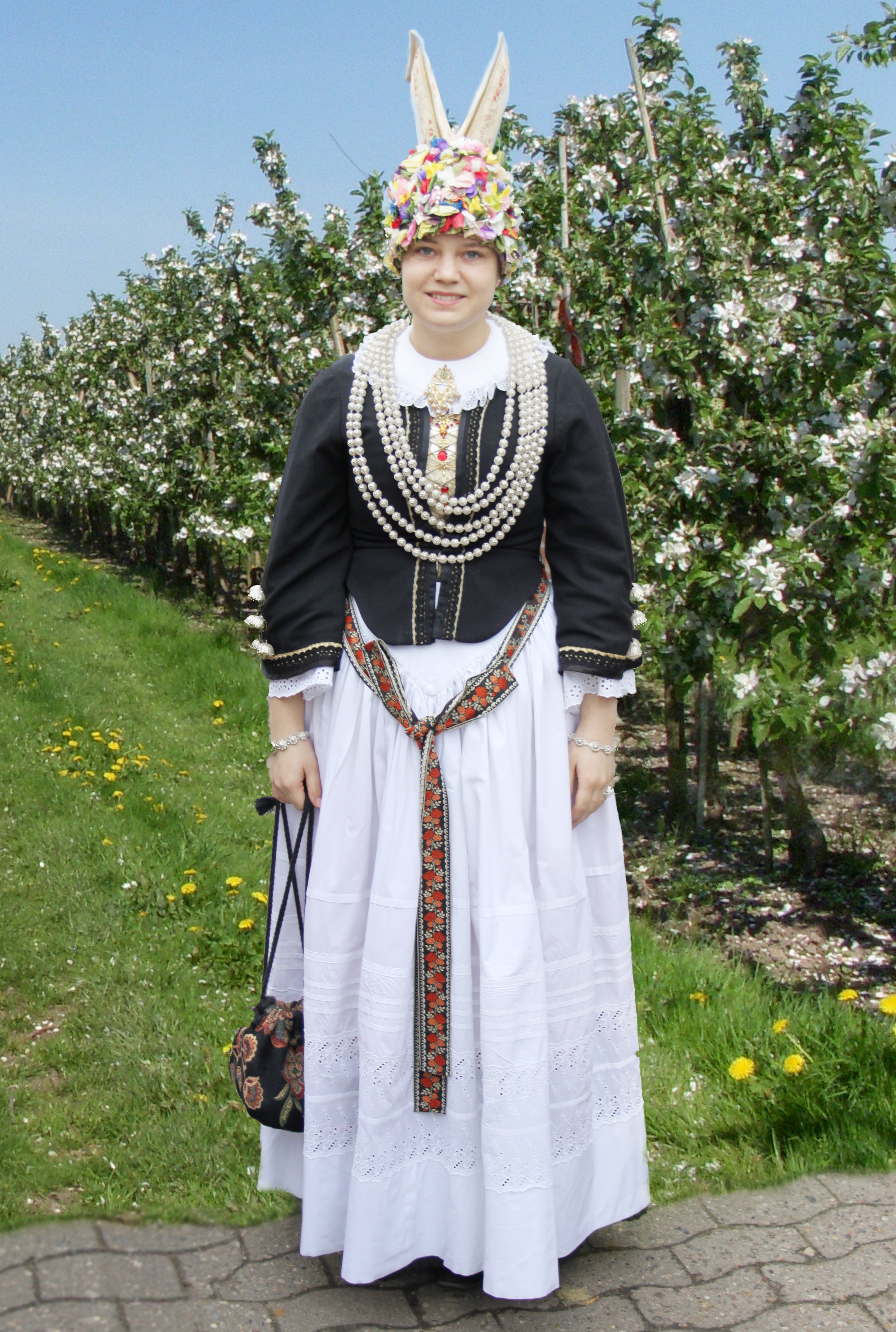 Blütenkönigin Sandra Müller